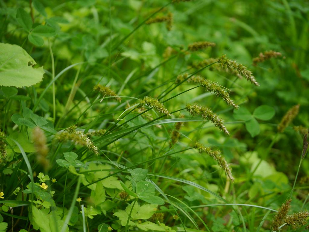 Carex albata（Carex nubigena subsp. albata）：ミノボロスゲ 2018/06/10 長野県戸隠・Togakusi, Nagano Pref. Japan